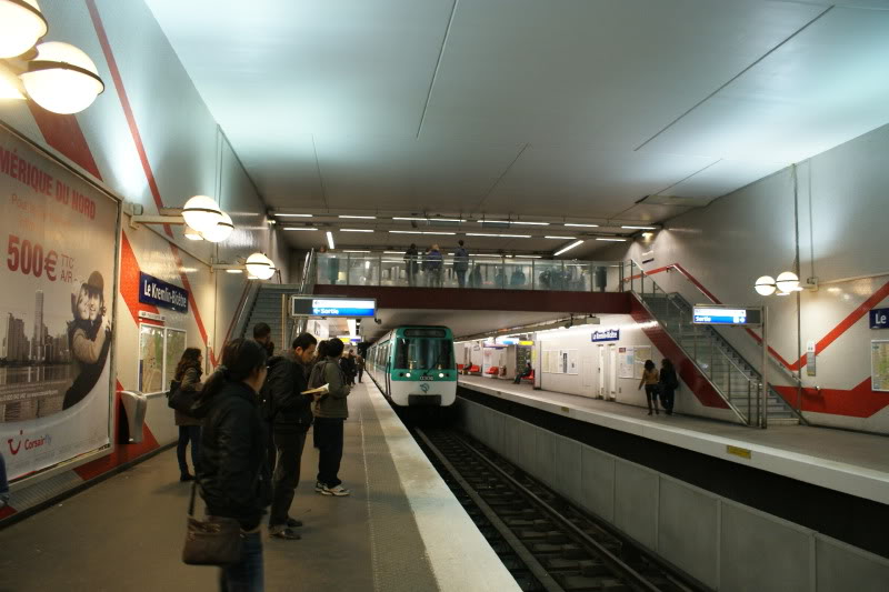 Andenes de la Estación Le Kremlin - Bicêtre